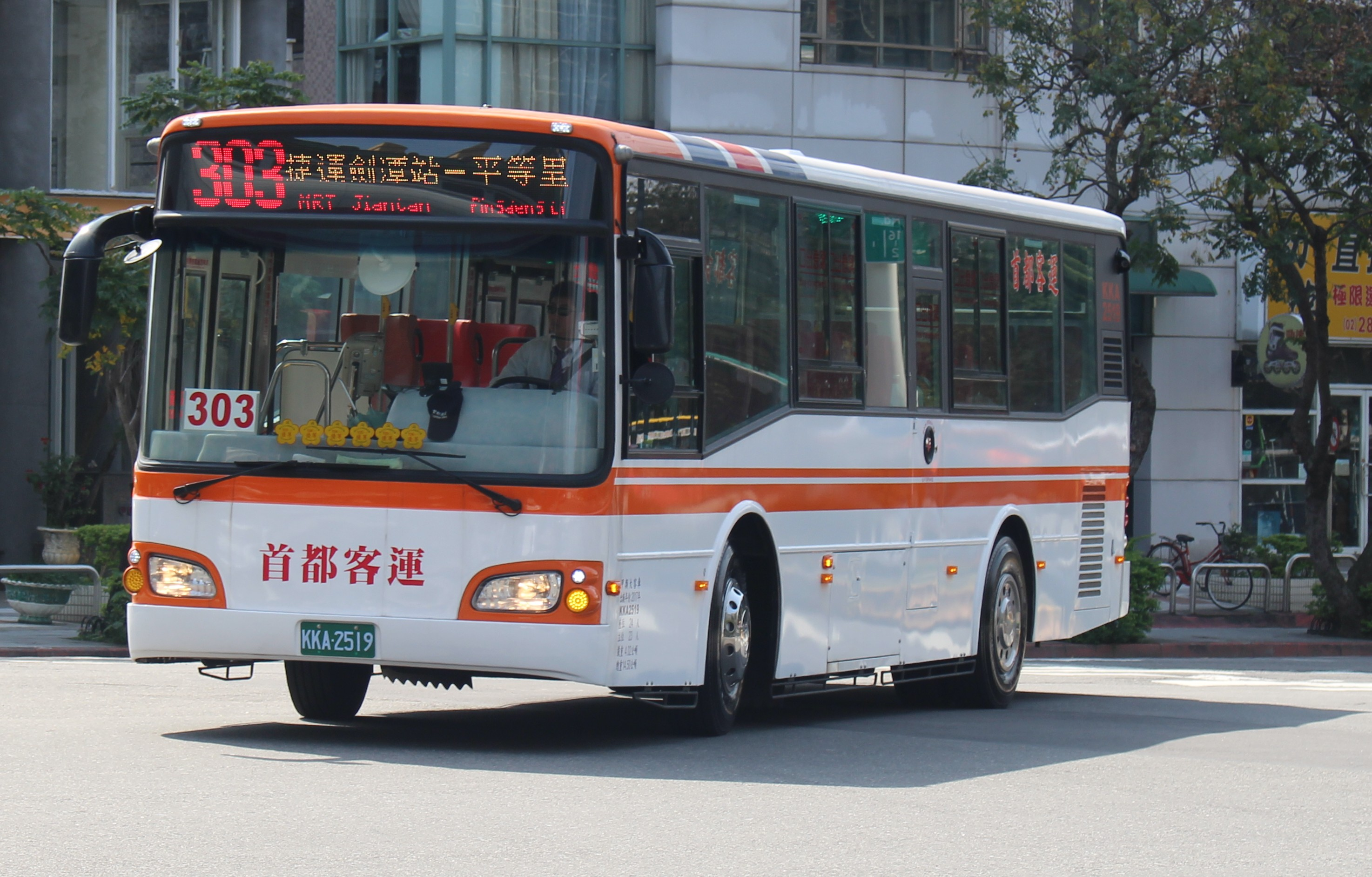 首都客運日野RK8JMVA-KJF固亞車體雙門大客車KKA-2519